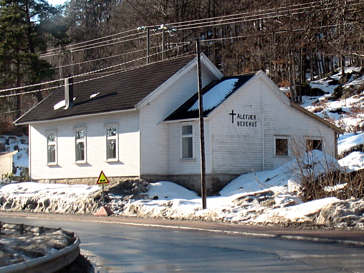 Ålefjær bedehuskapell i bydelen Ålefjær i Kristiansand kommune, Vest-Agder fylke. Bedehuset er oppført i tre og ligger ved RV453.